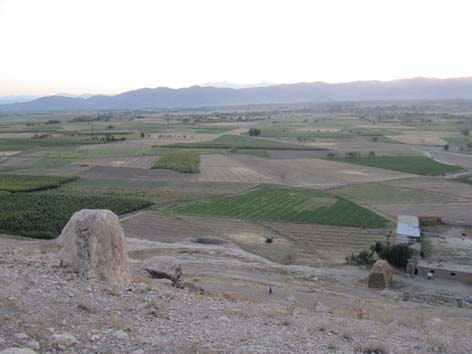 نمایی از بخش شرقی روستای قرقلعه